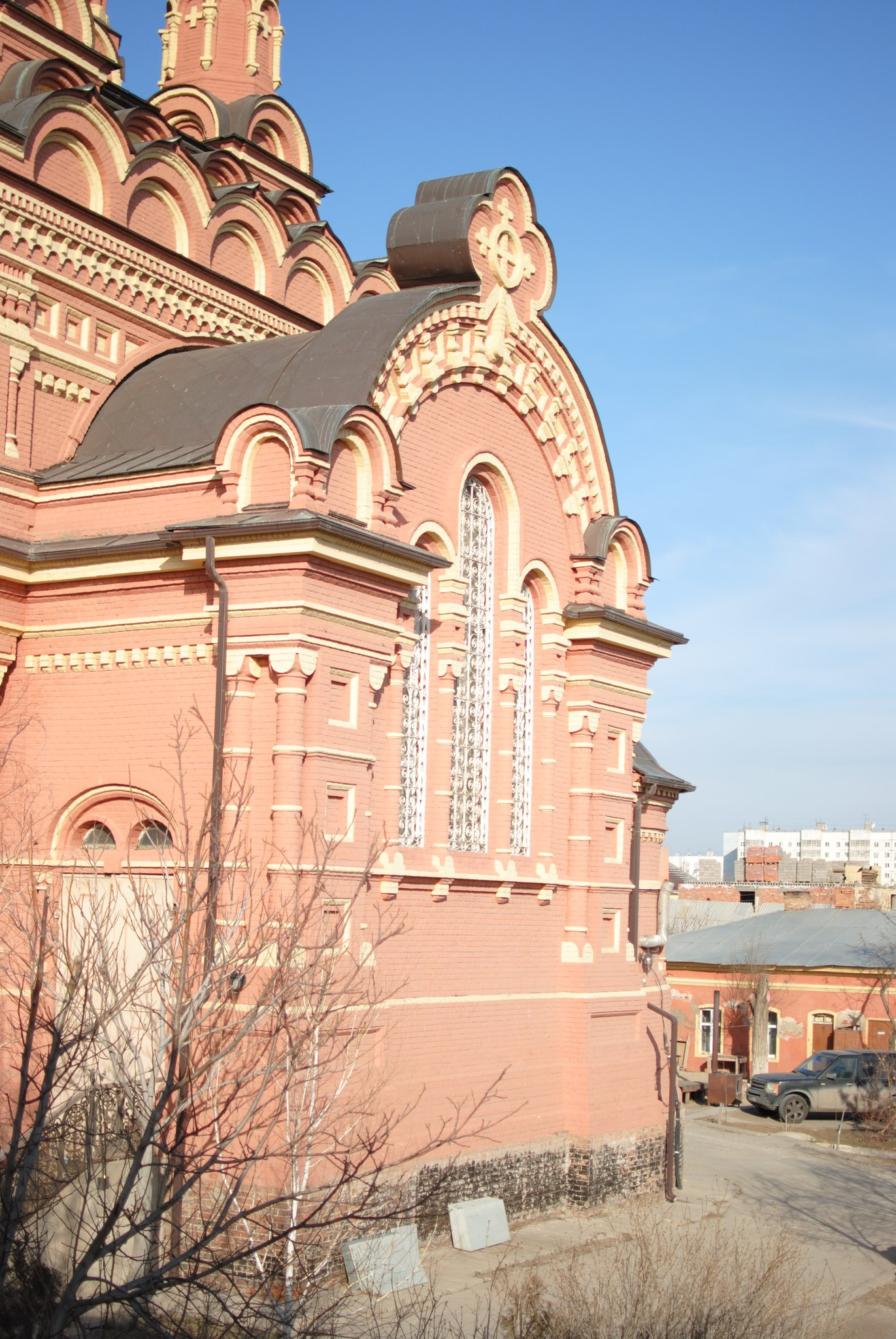 Храм Иоанно-Предтеченского монастыря, г.Астрахань